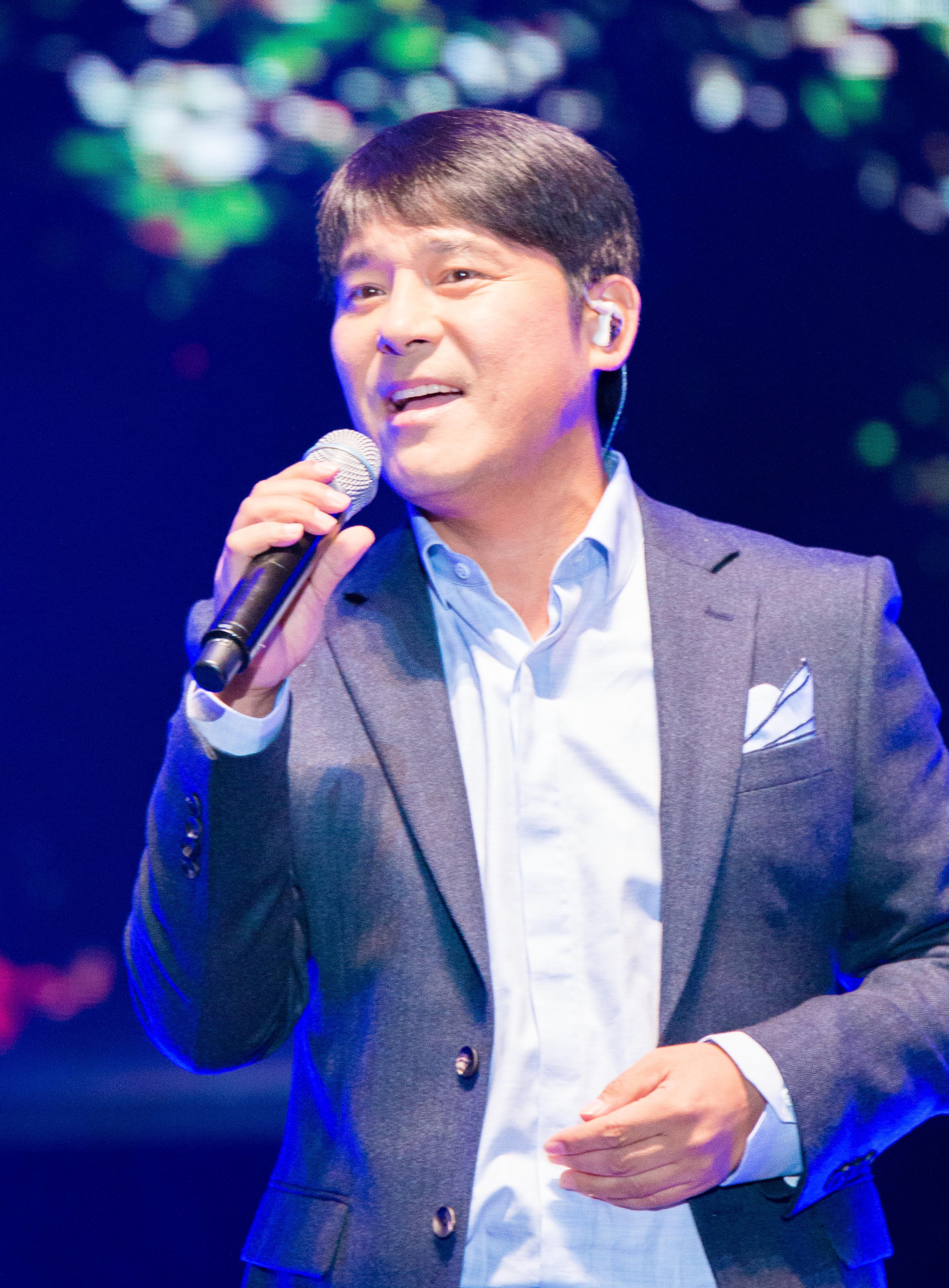 20161009 임창정 김창렬의 올드스쿨 공개방송